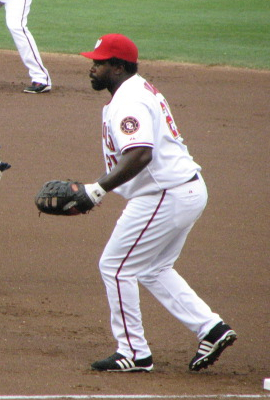 Dmitri Young